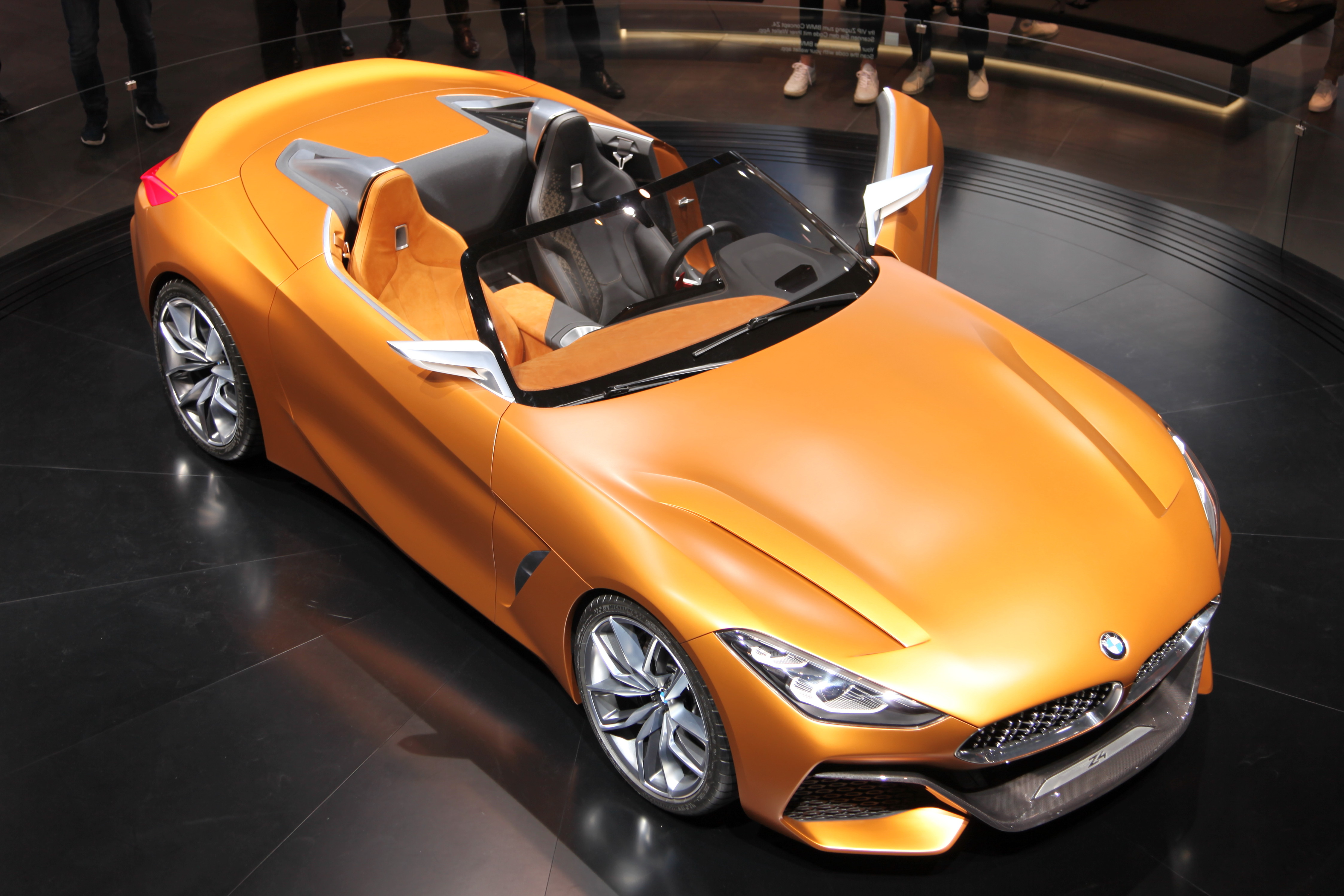 BMW Z4 Concept auf der IAA 2017